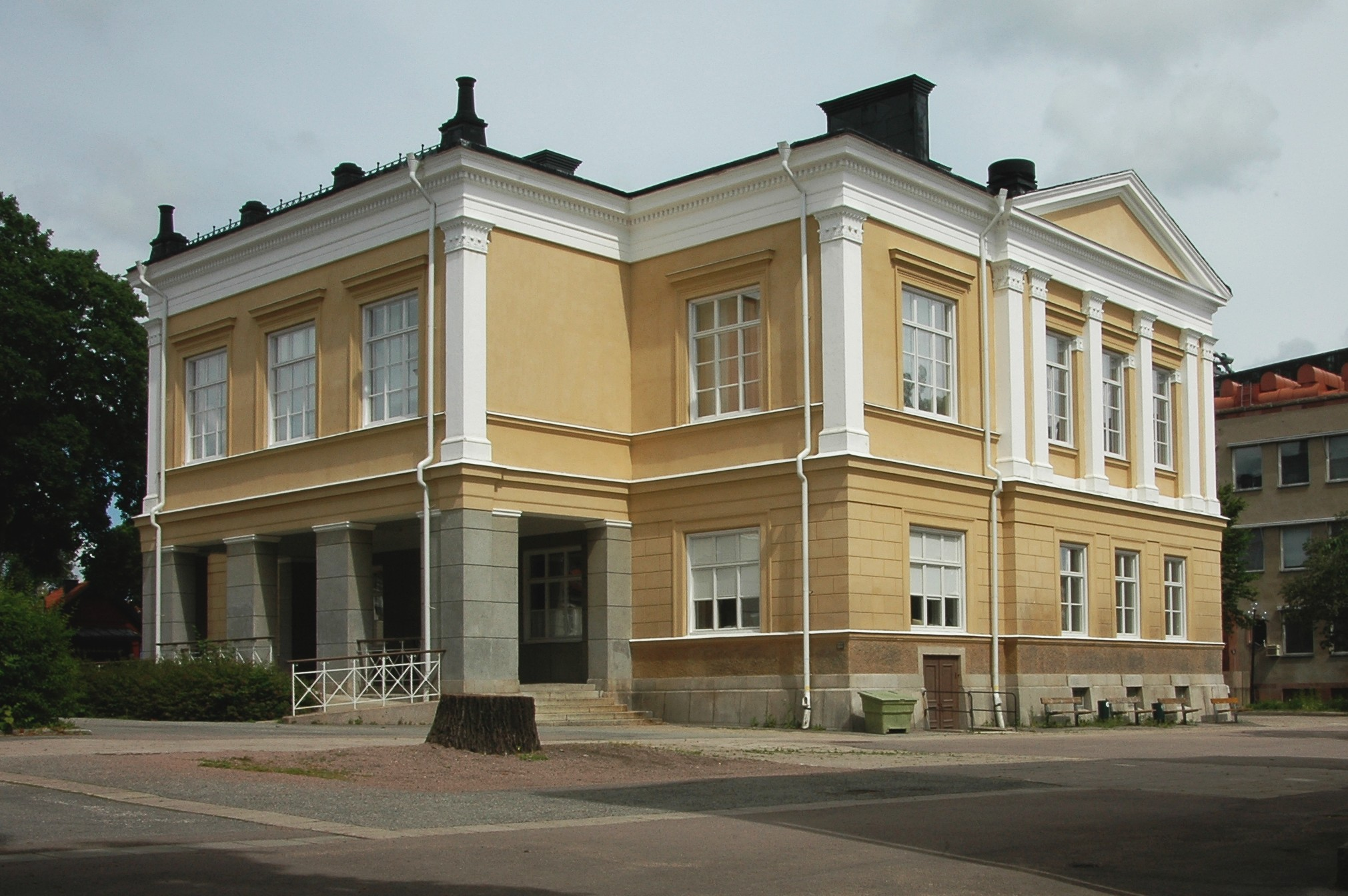 Rudbeckianska gymnasiet, Västerås. Gamla annexet. Byggnadsår Arkitekt Magnus Dahlander